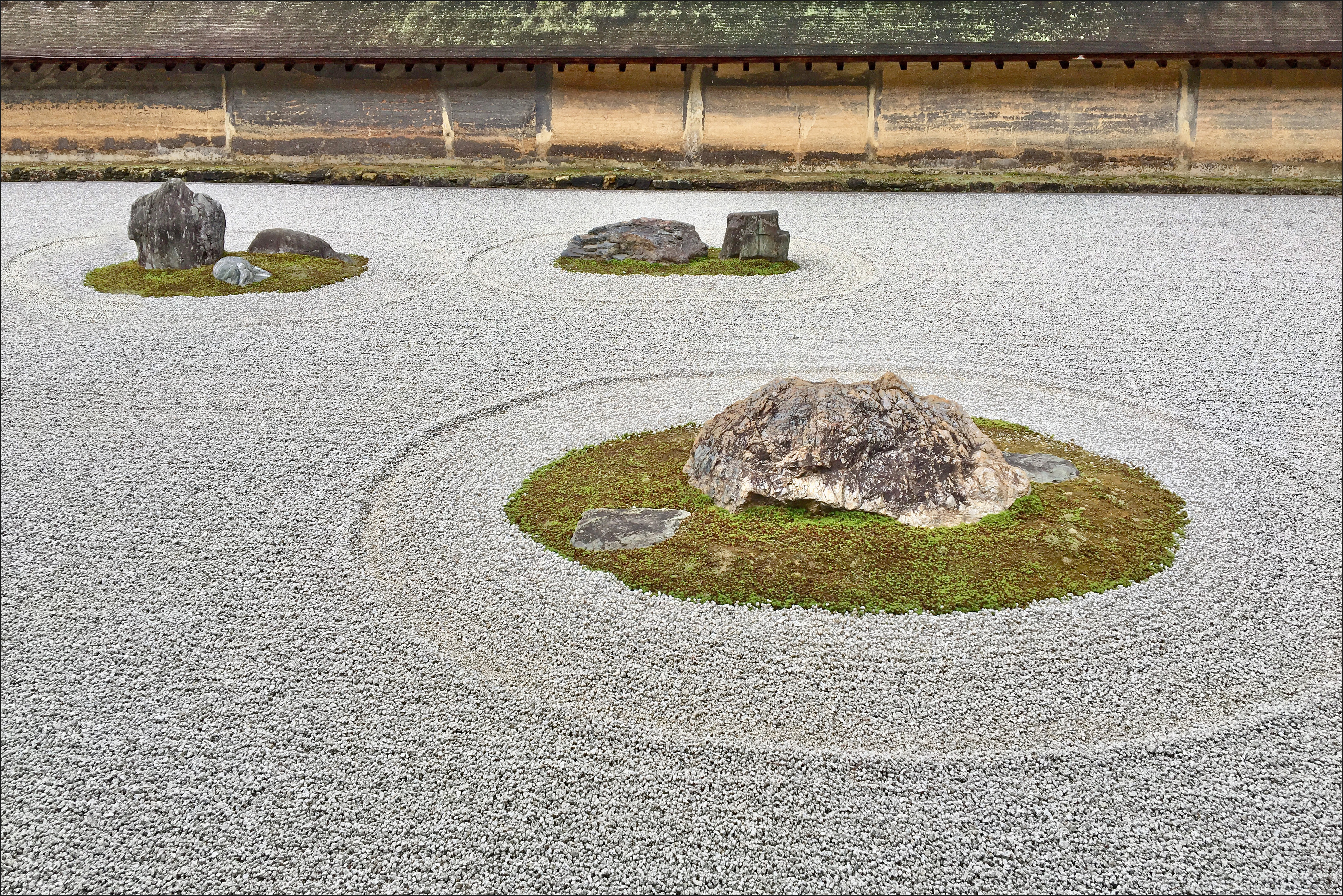 Le jardin sec (détail) Le jardin zen du temple bouddhique Ryôan-ji est un des plus célèbres jardins destinés à la méditation. Il serait l'oeuvre de maître Soami (1472-1523). De forme rectangulaire, il est entouré de murs sur 3 cotés. Chaque rocher symbolise un continent ou une île du monde. Le jardin est classé au patrimoine mondial de l'UNESCO Article de Wikipedia sur le temple et son jardin zen Le site officiel du temple